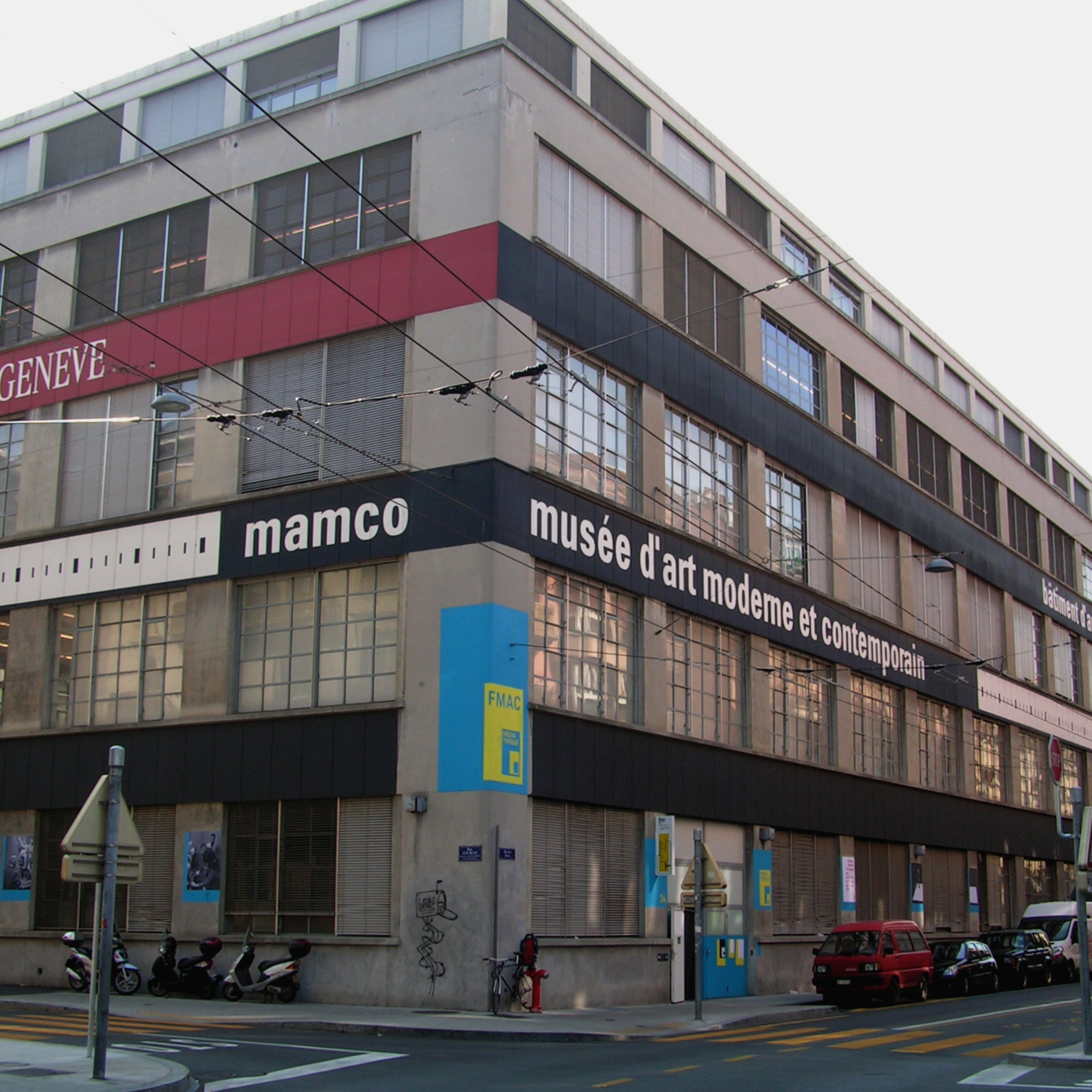 Rue de Vieux-Grenadier 10, Genève. Musée d'art moderne et contemporain (MAMCO) et fonds d'art contemporain de la ville de Genève (FMAC). Vue générale depuis la rue du MAMCO et de l'entrée du FMAC.